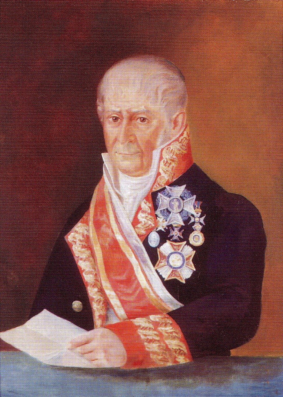 Andrés Perez de Herrasti (1750-1818), général espagnol célèbre pour avoir défendu Ciudad Rodrigo lors du siège de la ville par les Français en 1810.